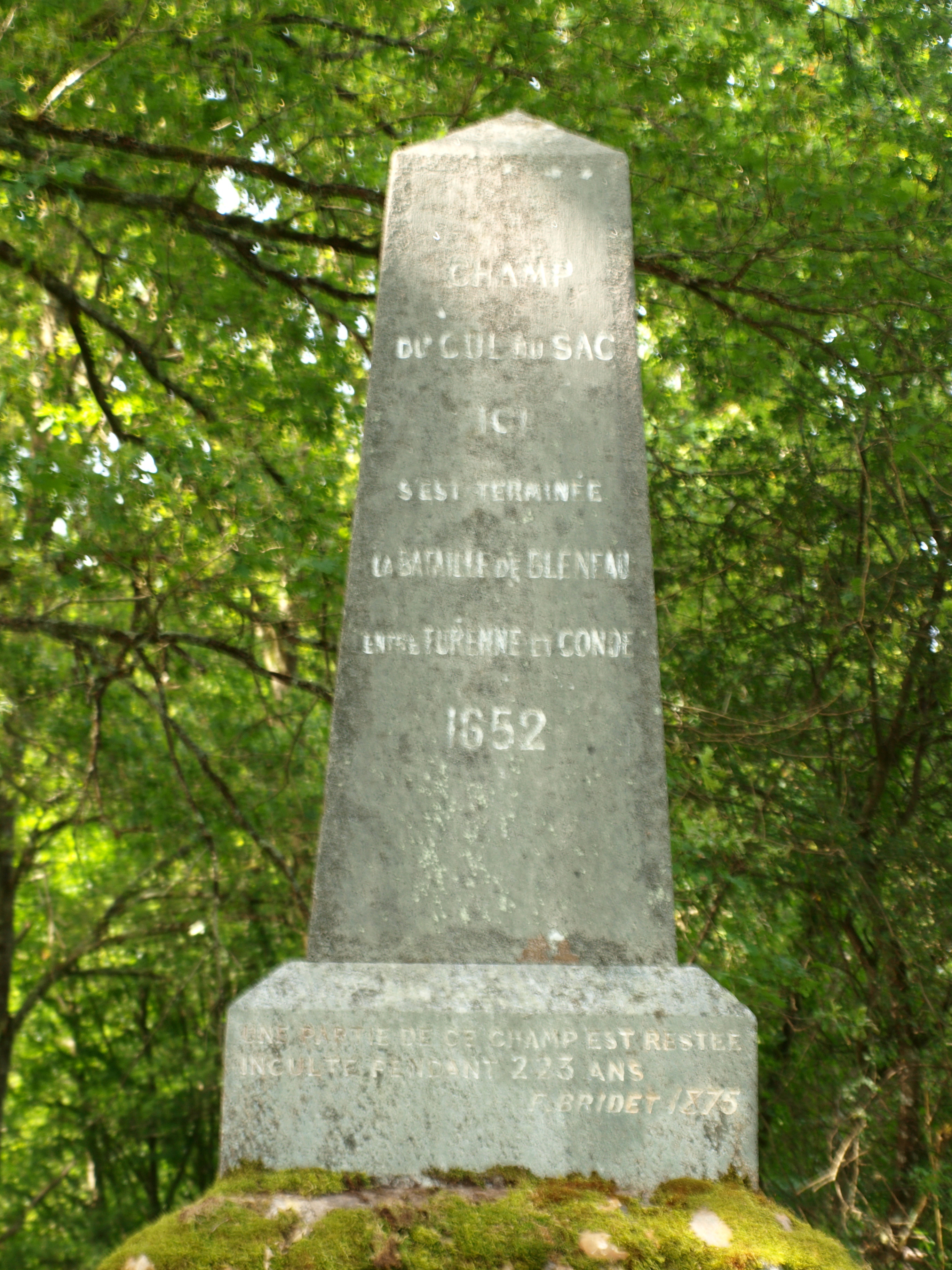 Breteau (Loiret, France); Champ du Cul-de-Sac : Ici s’est terminée la bataille de Bléneau entre Turenne et Condé - 1652. Une partie de ce champ n’a pas été cultivée pendant 223 ans – F. Bridet 1875